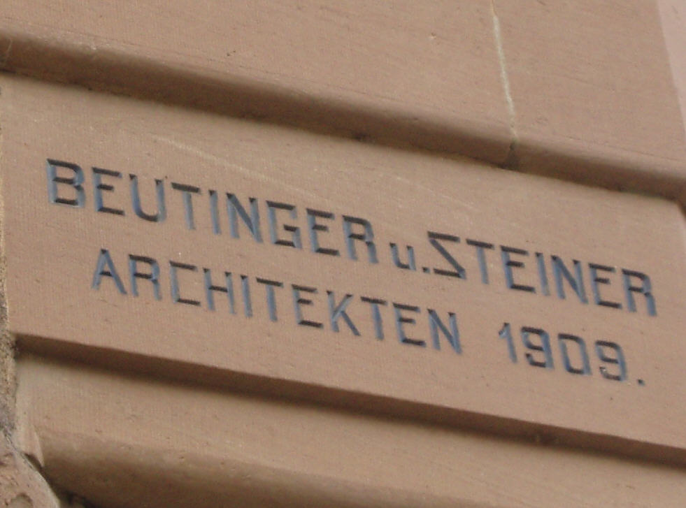 Hinweis auf die Erbauer Beutinger und Steiner am Haus Kernerstraße 66 in Heilbronn, 1909